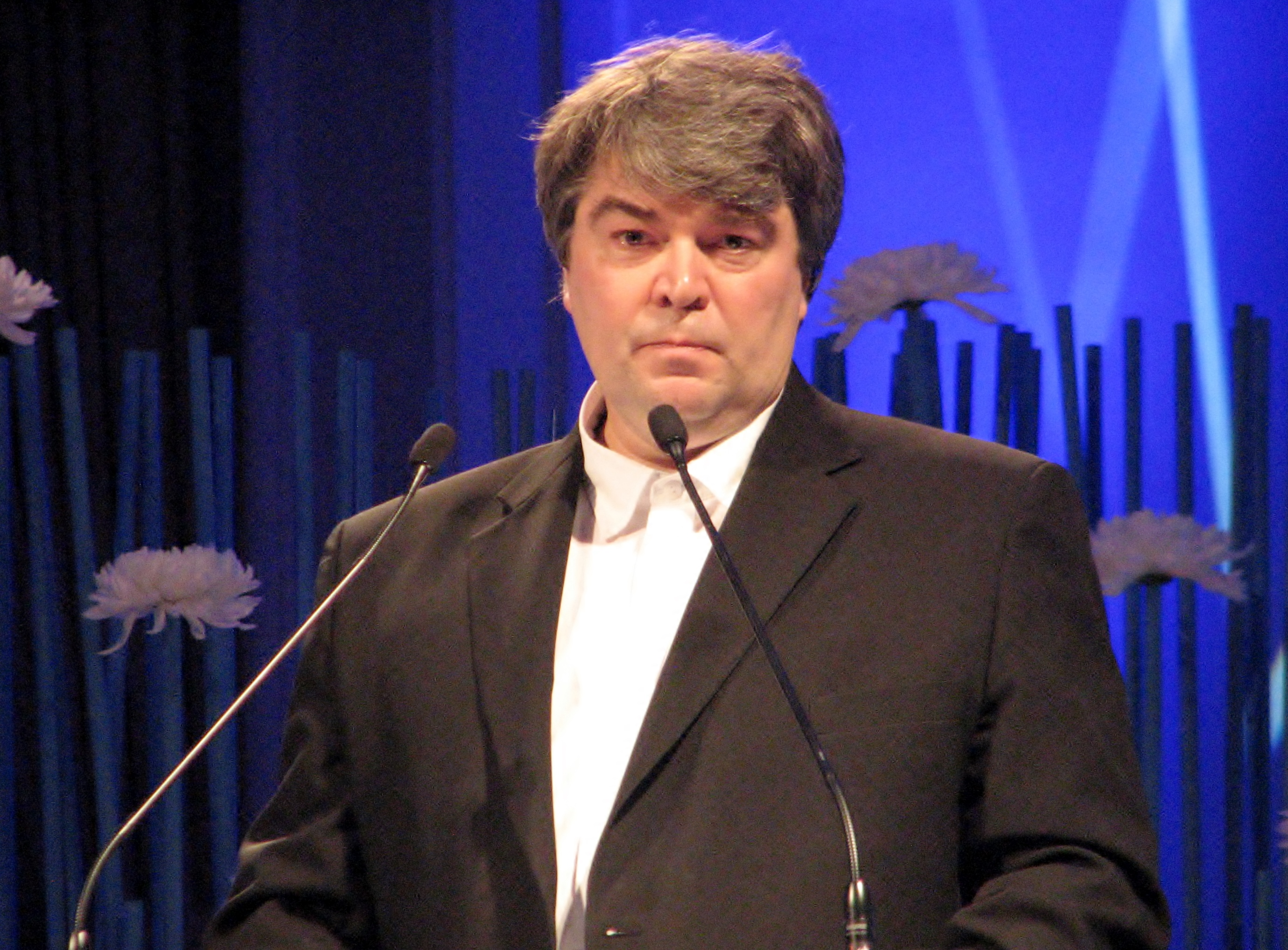 Mart Raukas esinemas Estonia kontserdisaalis konverentsil "ERSP 25 – milleks meile erakonnad?"